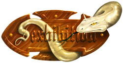 Logo for Sexhibition